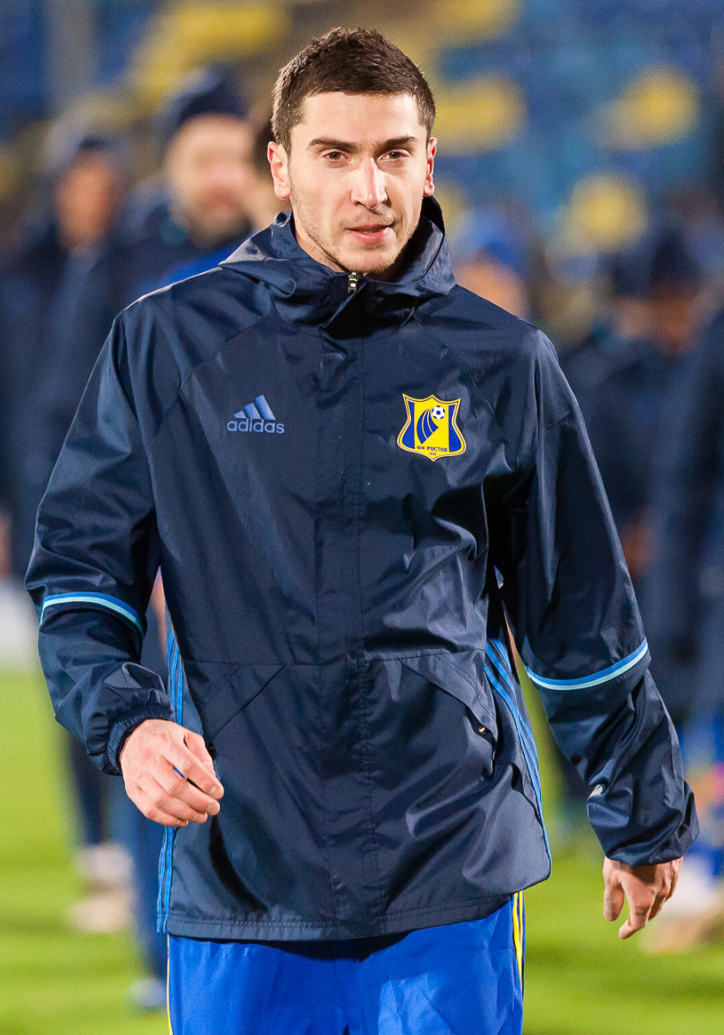 «Ростов» с Кириченко у руля принимал дома «Уфу»